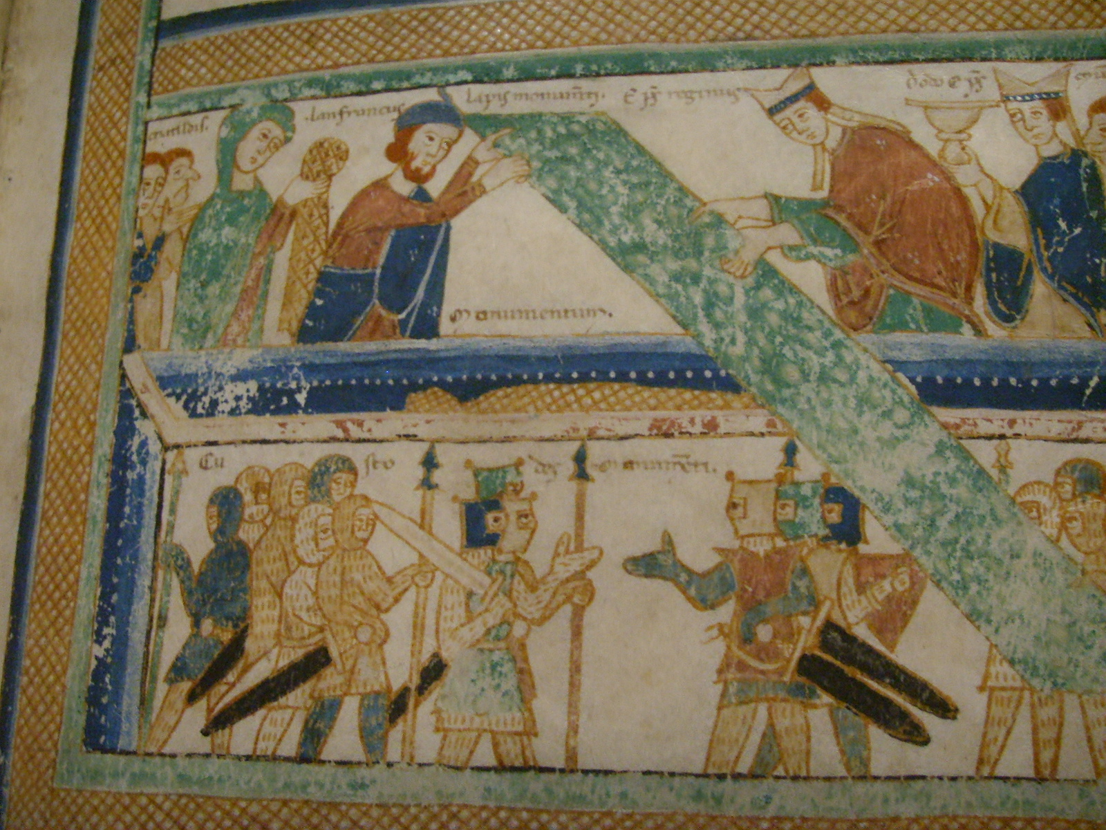 Lanfranco, Matilde di Canossa e i vescovi di Modena e di Reggio. Da: Relatio de innovation ecclesia Sncti Geminiani, Modena, archivio capitolare, ms. O.II.11, inizio XII sec.